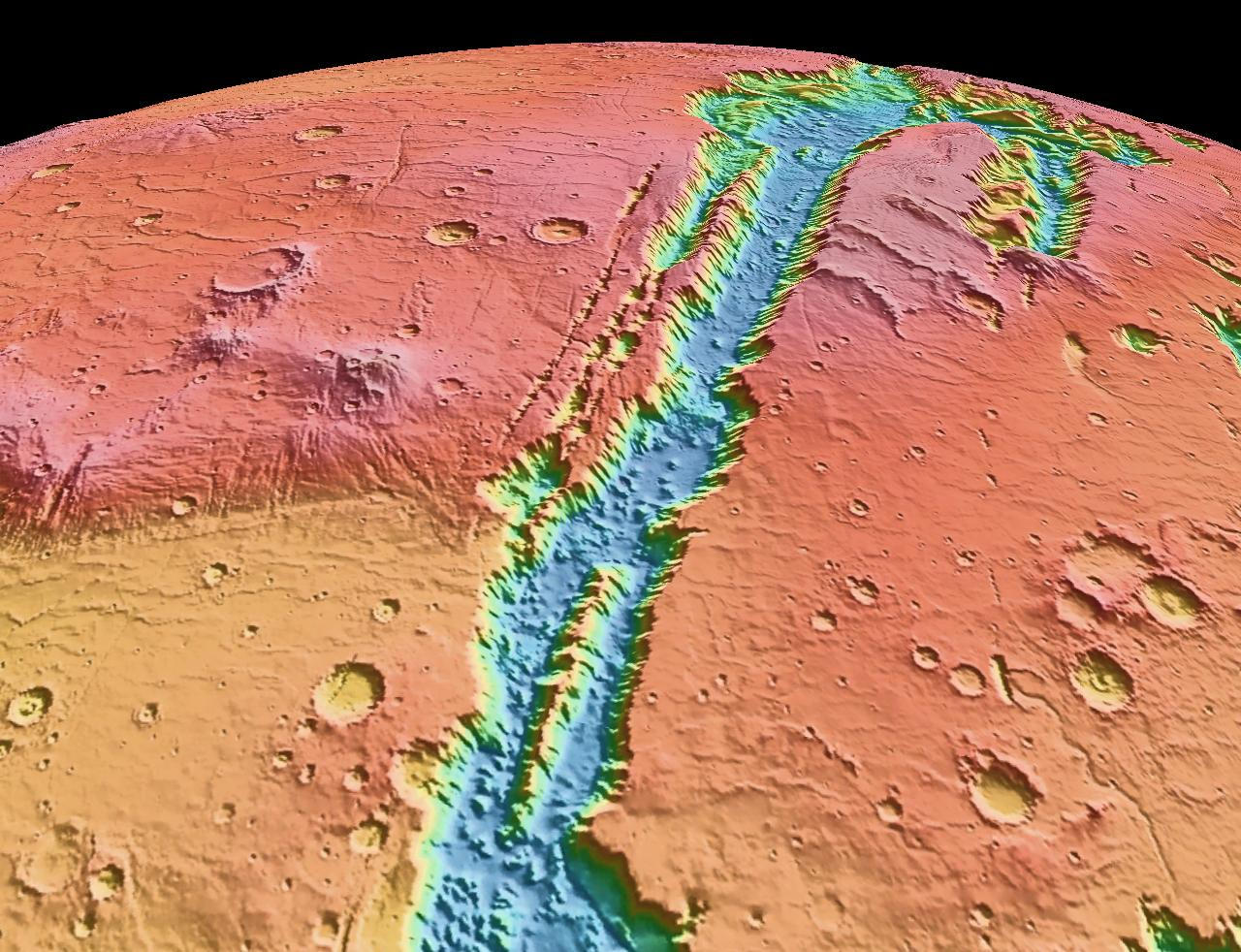 NASA World Wind - Mars (MOLA Shaded elevation Layer)